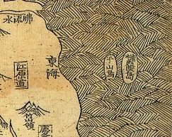 《신증동국여지승람》팔도총도(1530)조선 성종